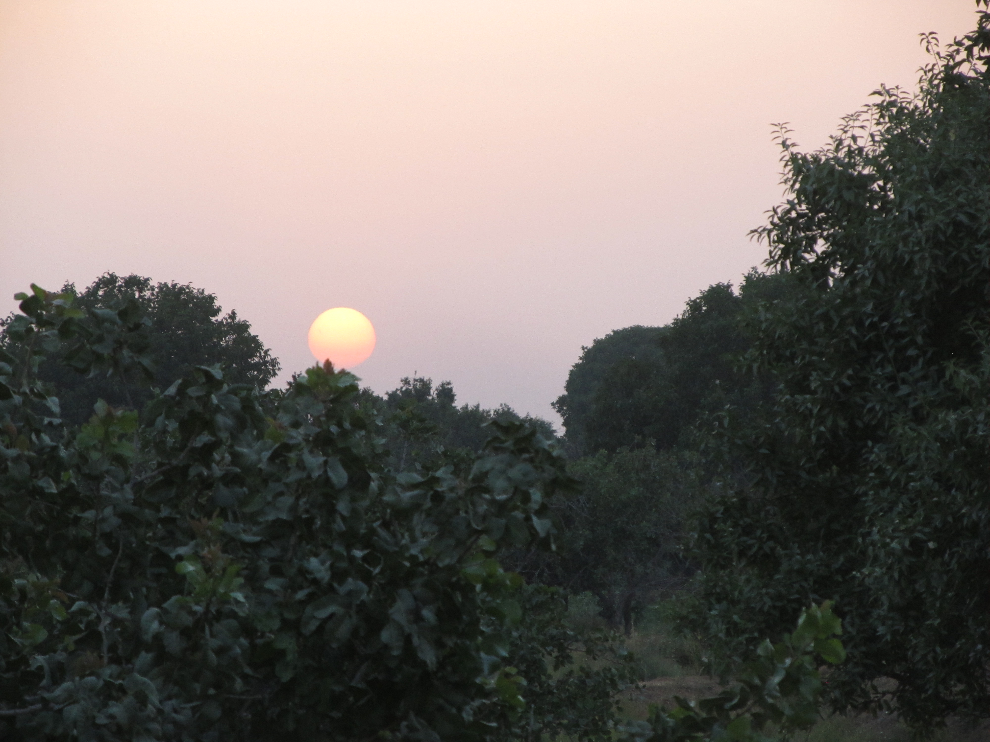 باغستان های سنتی قزوین